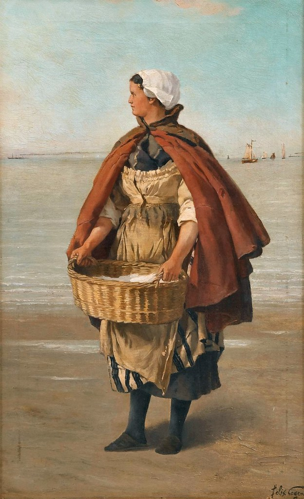 De vissersvrouw